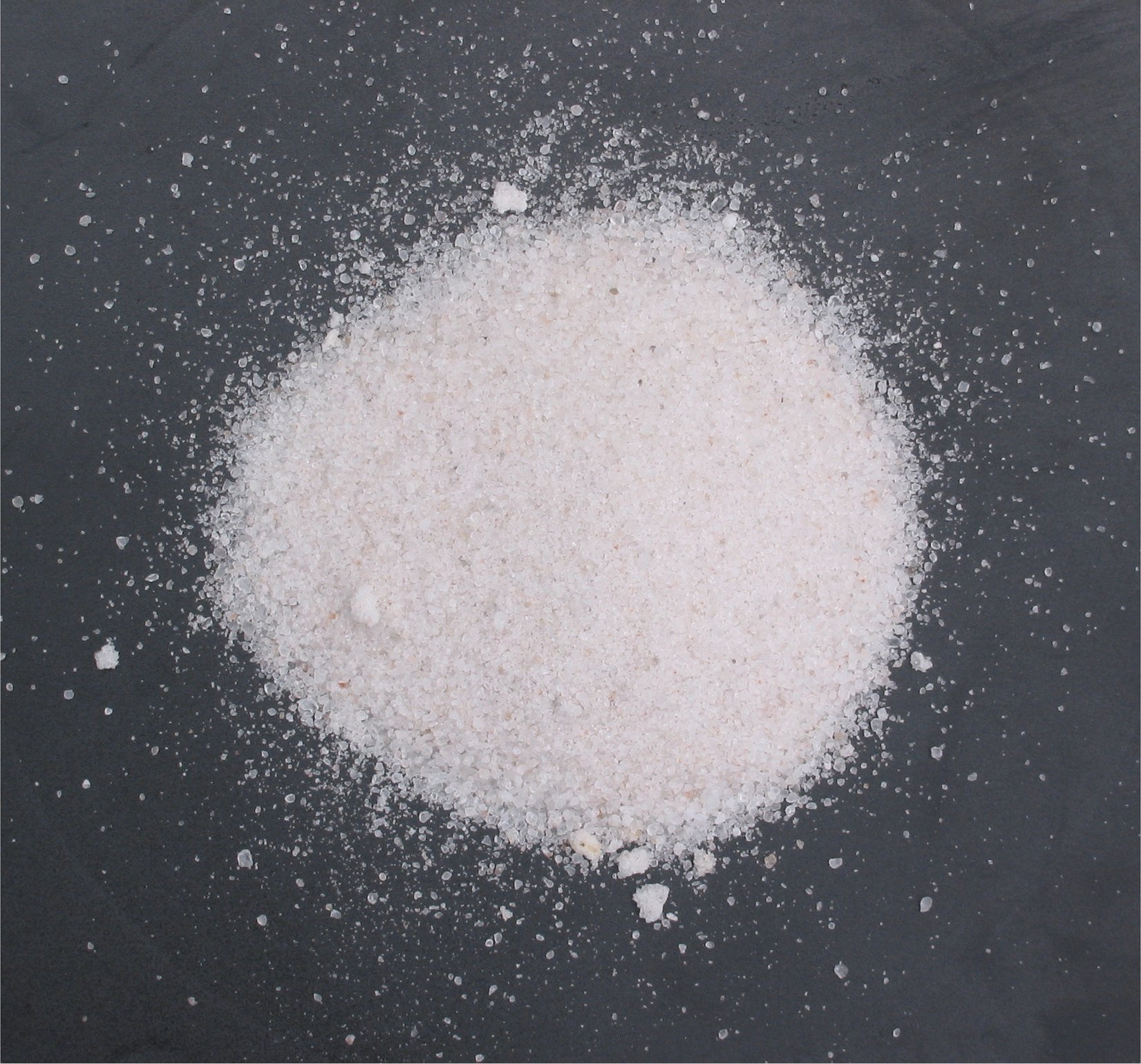 (Kieseriet) Kieserite